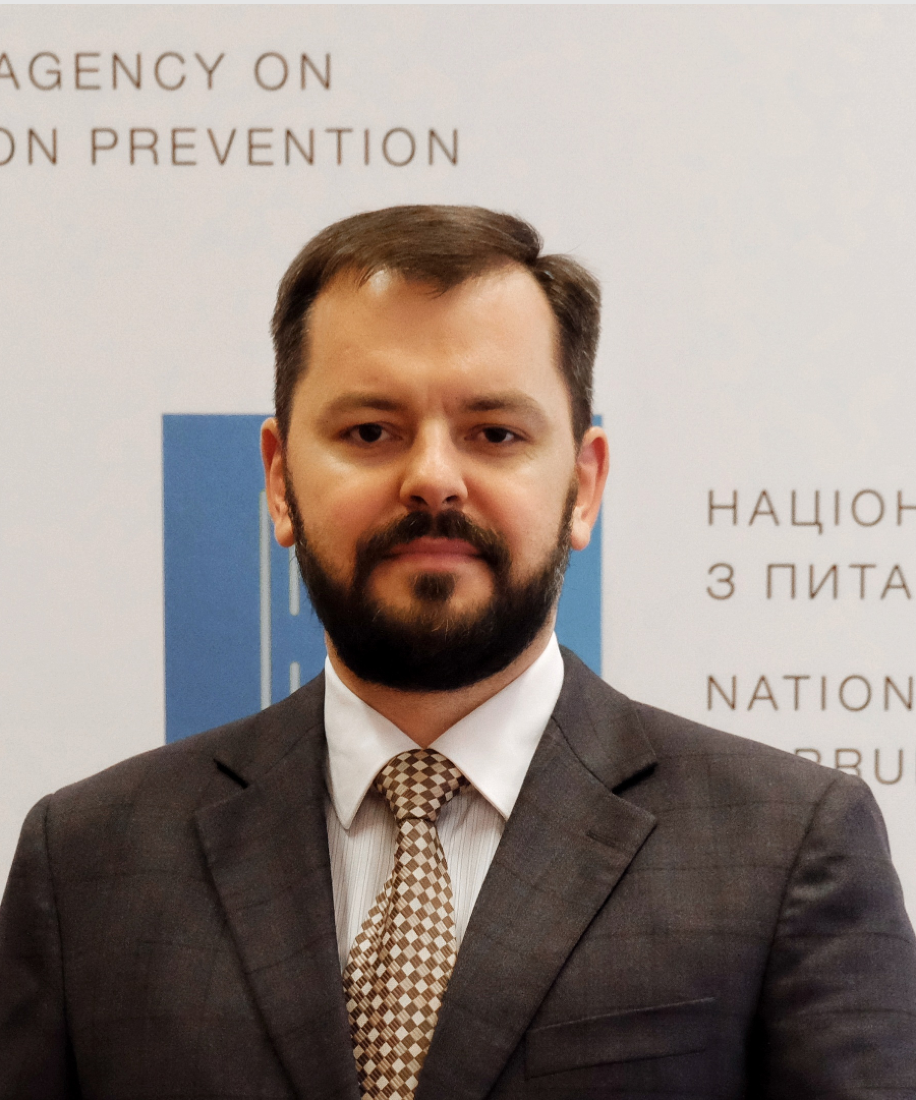 Станіслав Патюк